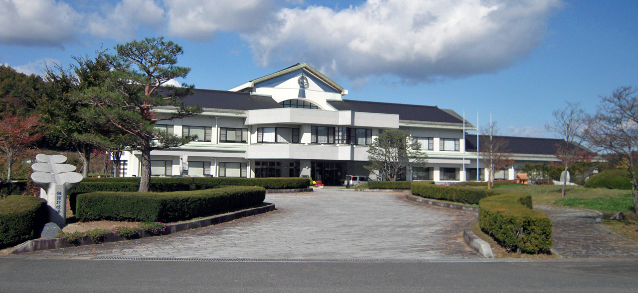 Vue de la mairie à Iitate